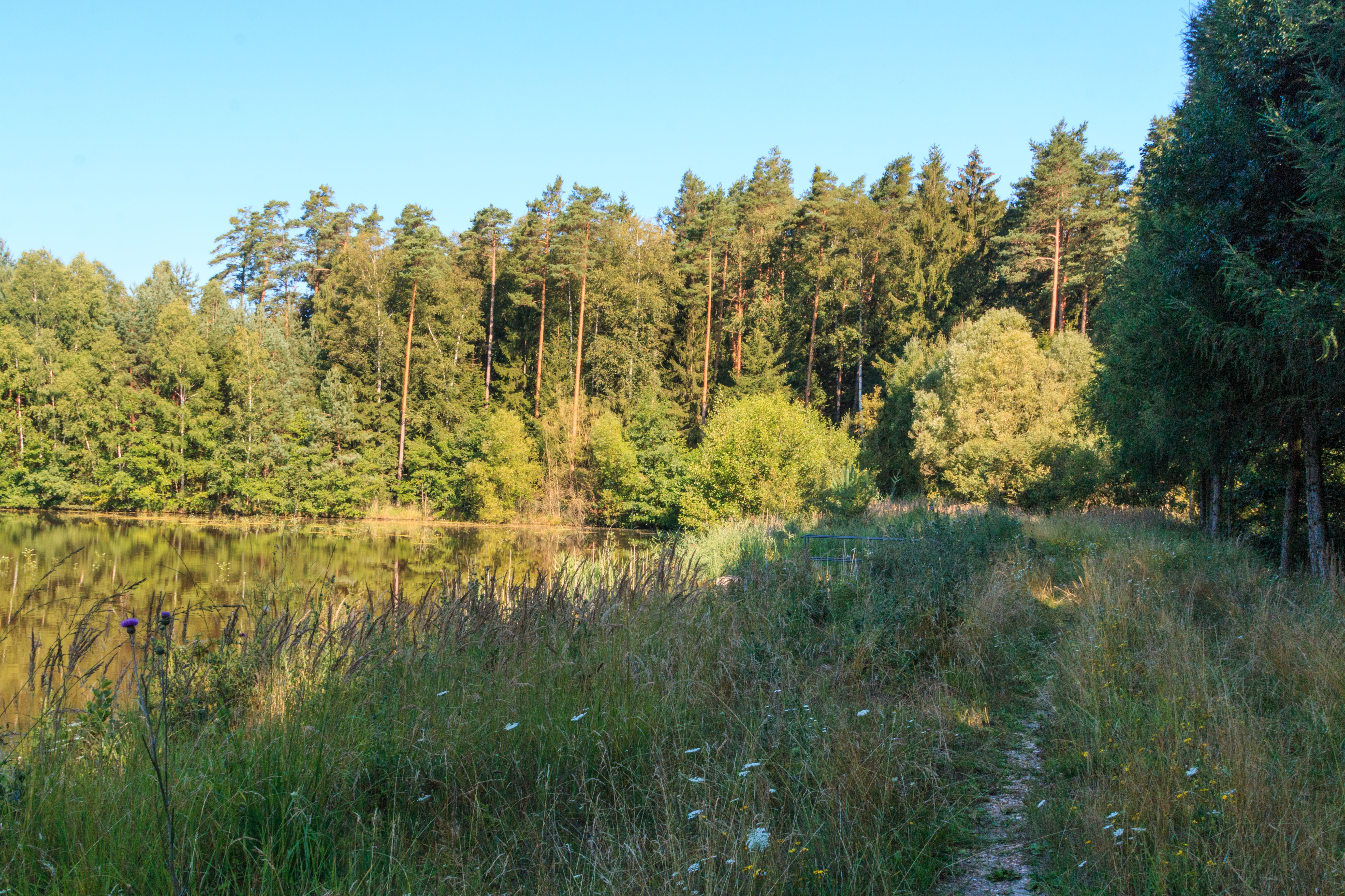 Oborecký rybník u Horního Jelení Project: Vodstvo